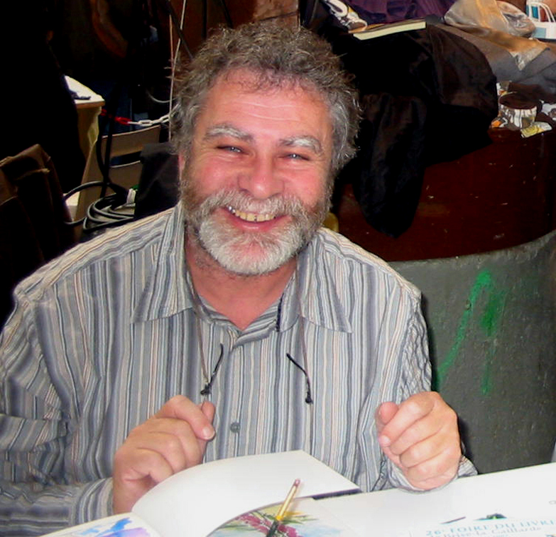 Daniel Brugès en dédicace à la foire du livre de Brive-la-Gaillarde.